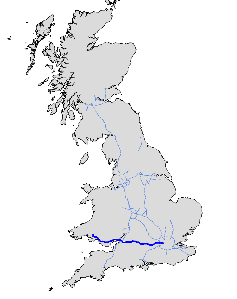 M4